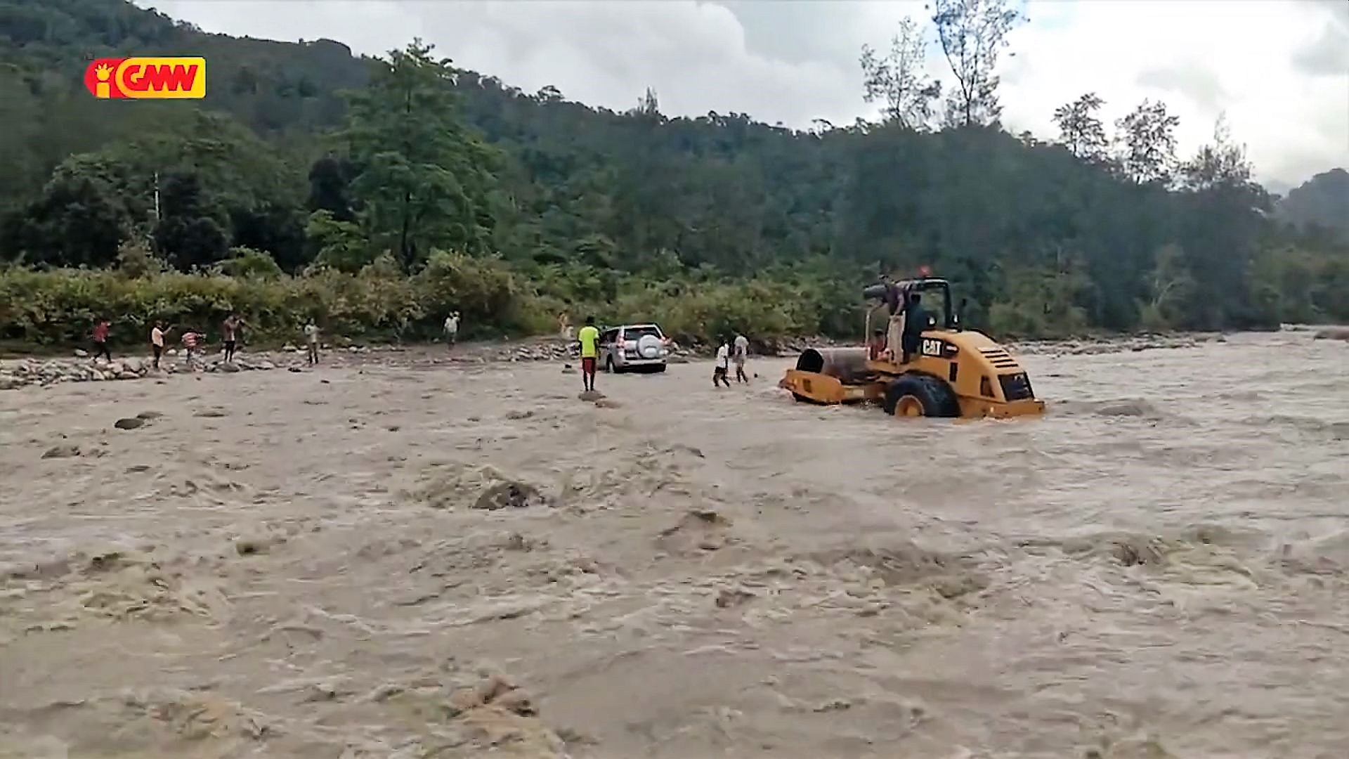 Rio Sáhen